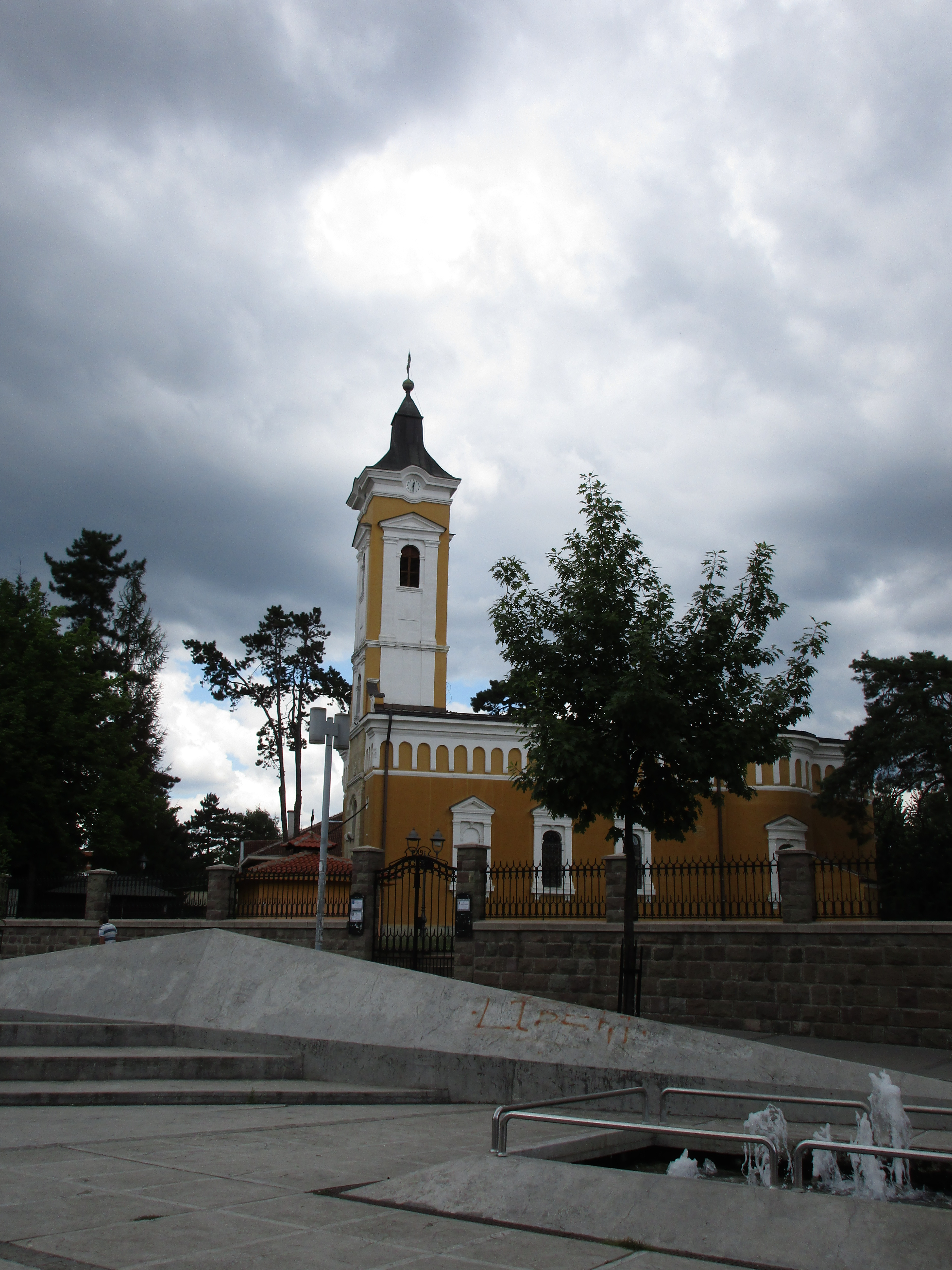 Srpski (latinica): Edu viki kamp 2017, foto tura u Kraljevu